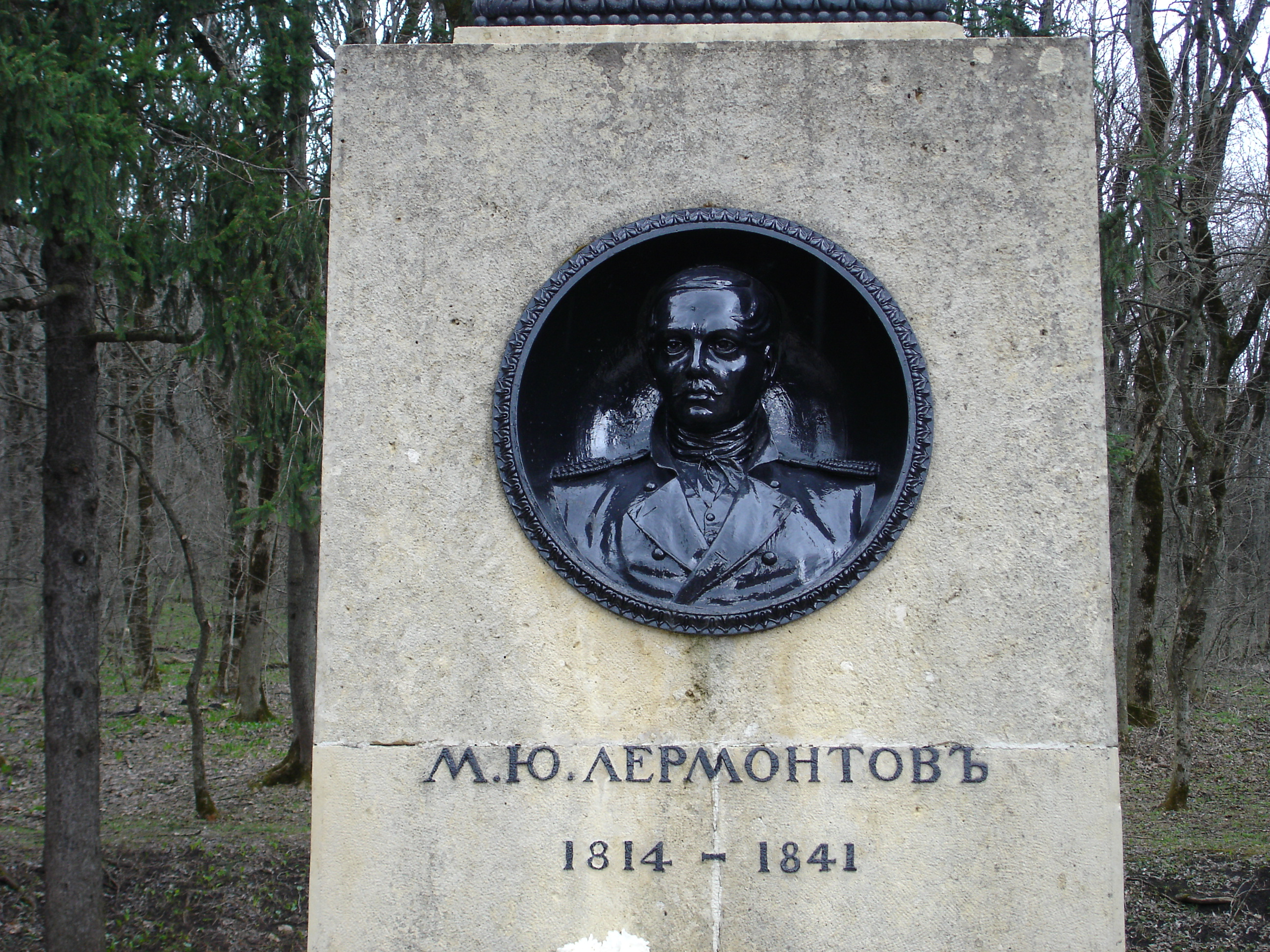 Pomnik Lermontowa w Piatigorsku w miejscu jego śmierci wskutek pojedynku